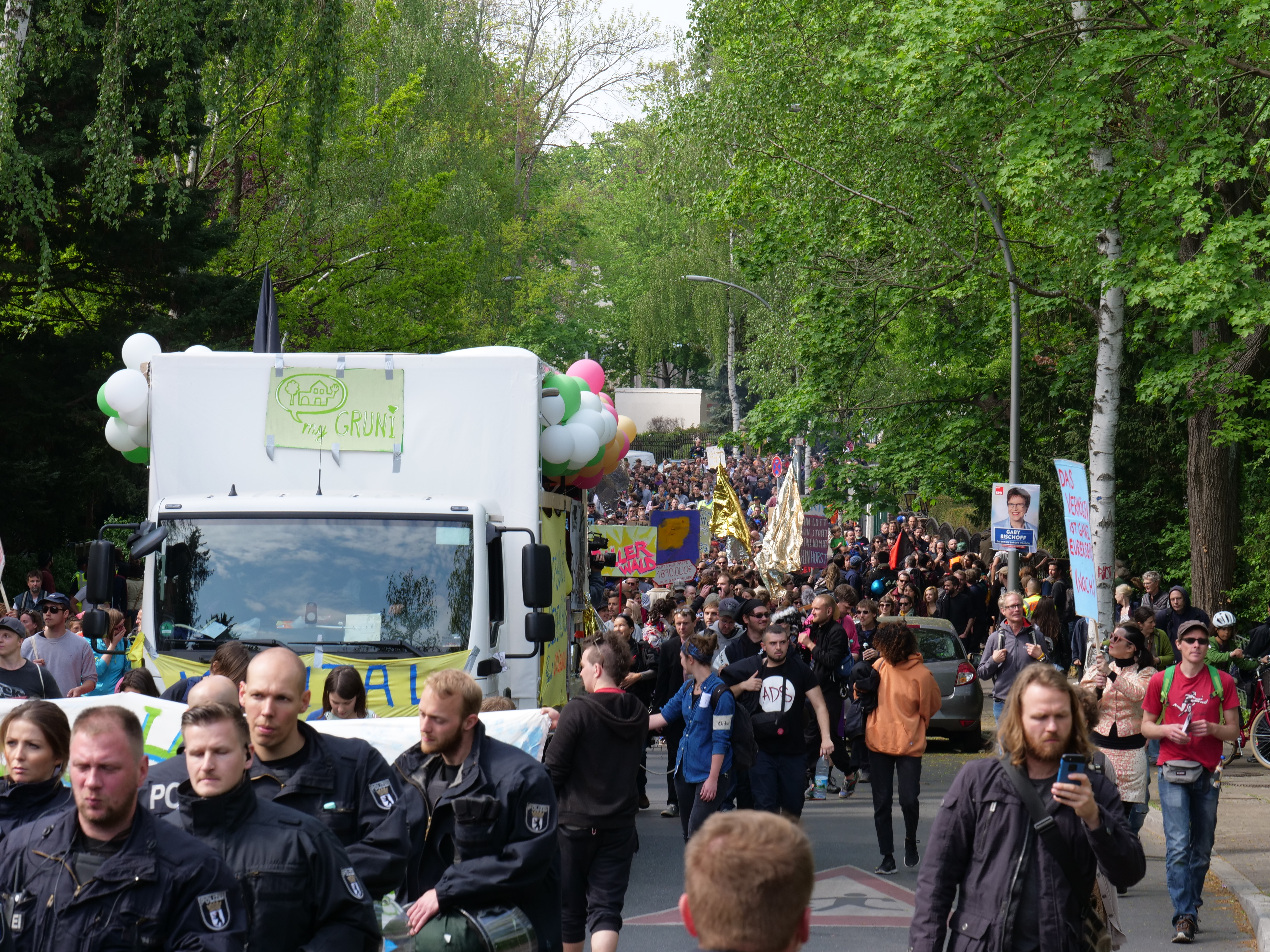 Demonstration zum ersten Mai im Grunewald in Berlin in 2019.